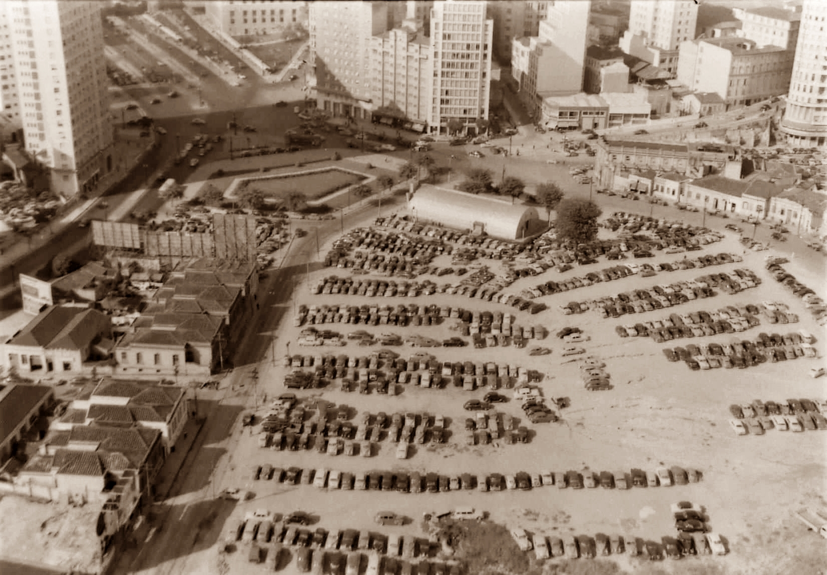 Vista panorâmica da Praça da Bandeira, 1954.